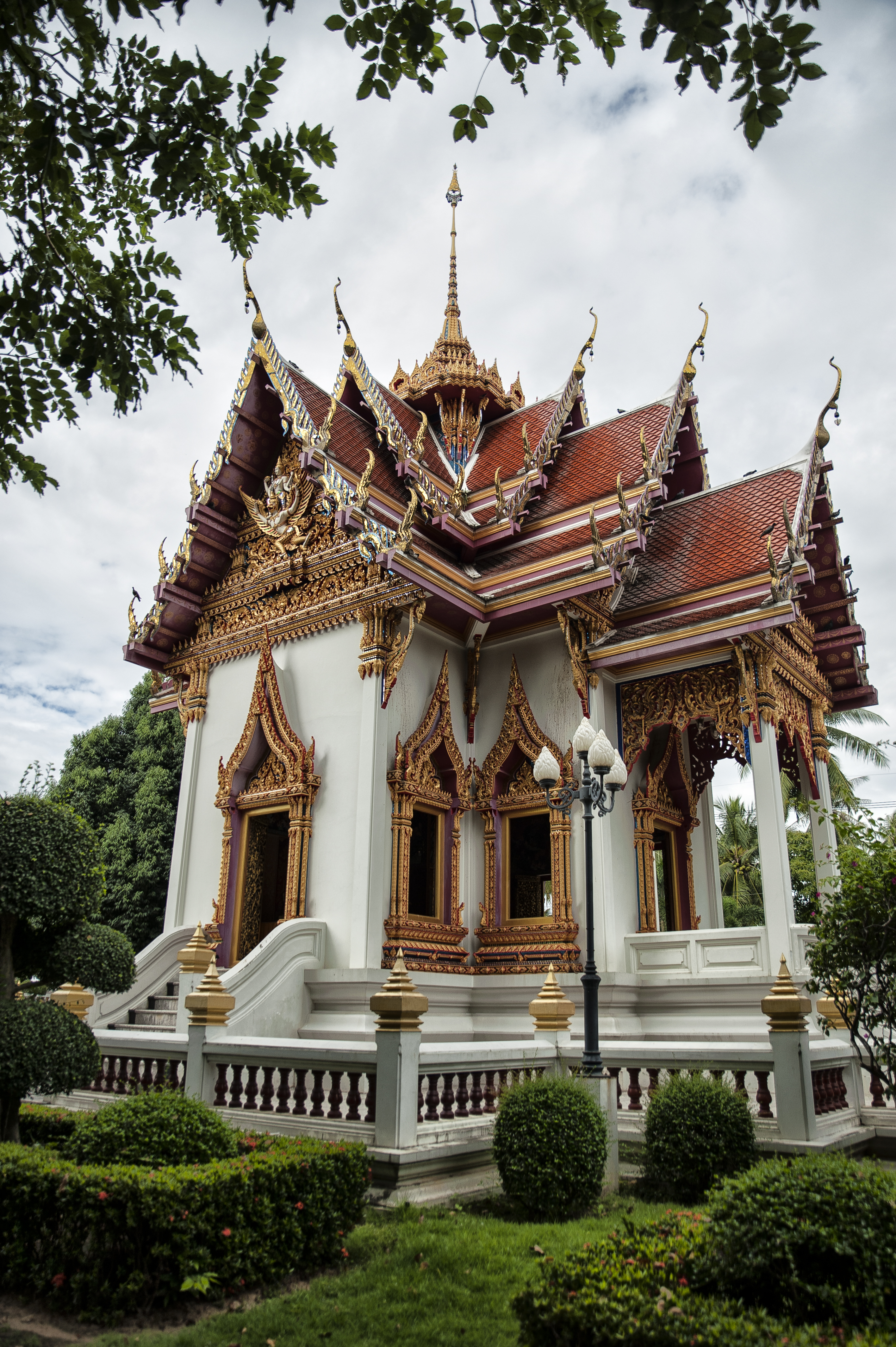 เป็นวัดเก่าแก่แห่งหนึ่งใน จ.ชลบุรี ยังคงมีโบสถ์เก่าให้ได้ศึกษา